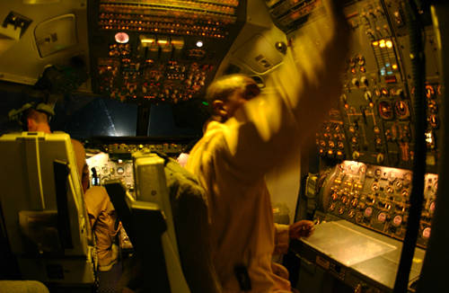 Tech. Sgt. Darren Holsendolph (right), a flight engineer from McGuire Air Force Base, N.J., runs through pre-flight procedures on a KC-10 Extender before a refueling mission out of the Arabian Gulf in support of Operation Enduring Freedom.